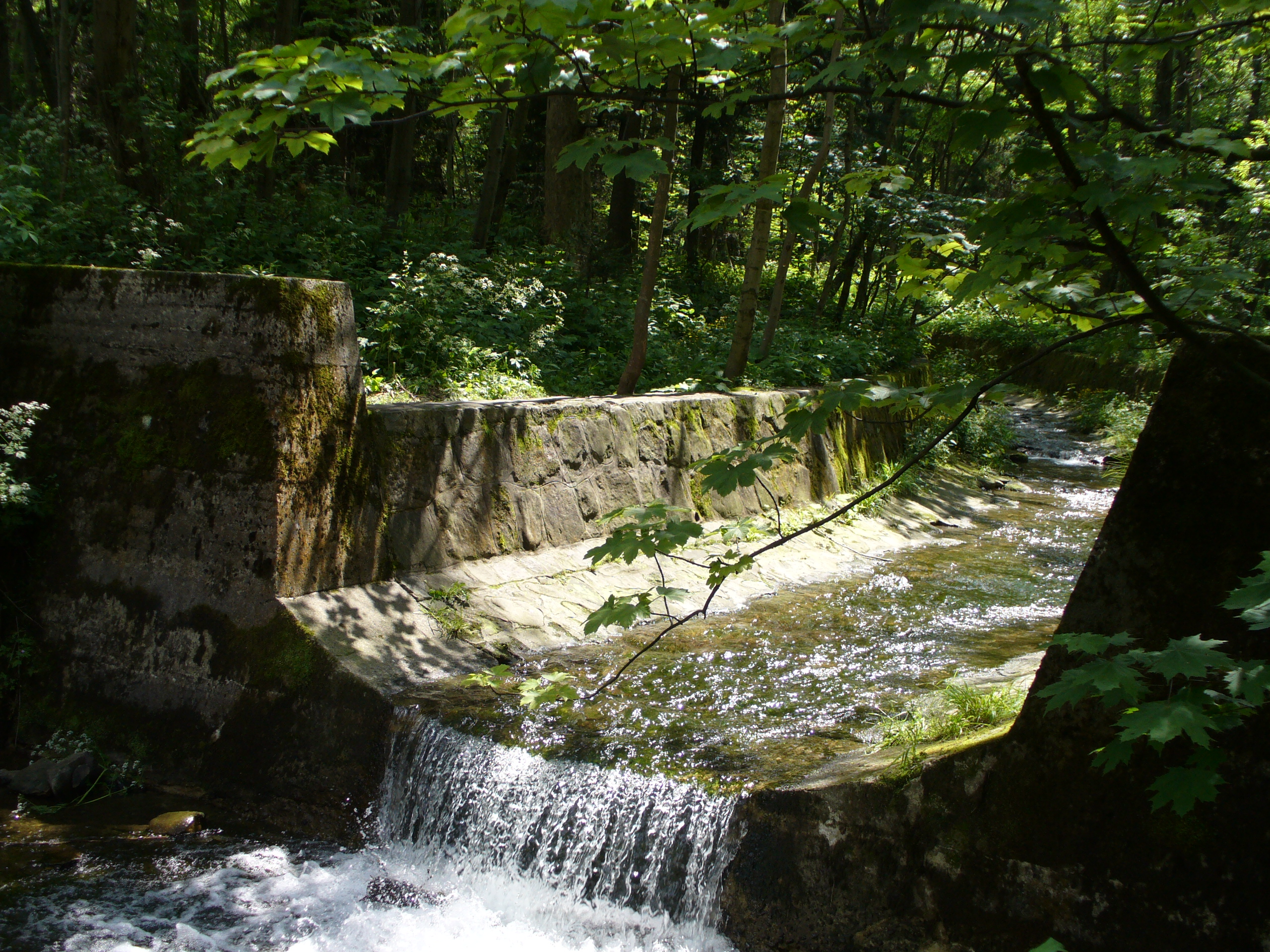 Próg wodny poniżej zbiornika "Wielka Łąka".